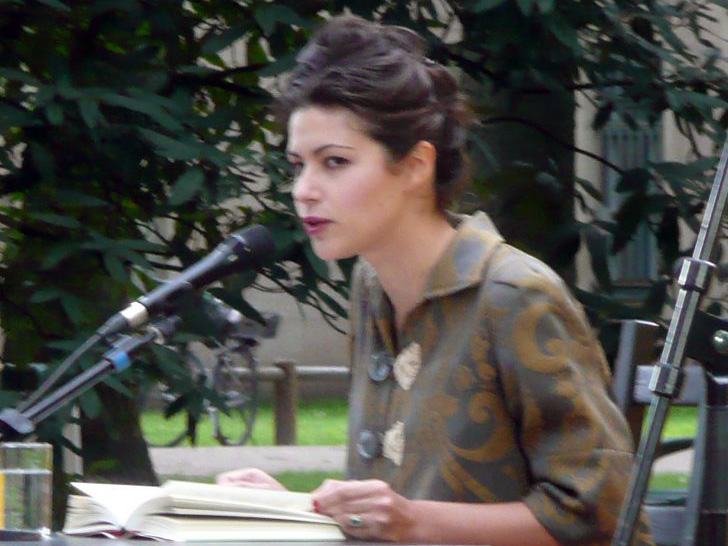 Die Schriftstellerin Mariam Kühsel-Hussaini liest auf dem Erlanger Poetenfest 2010 aus "Gott im Reiskorn"